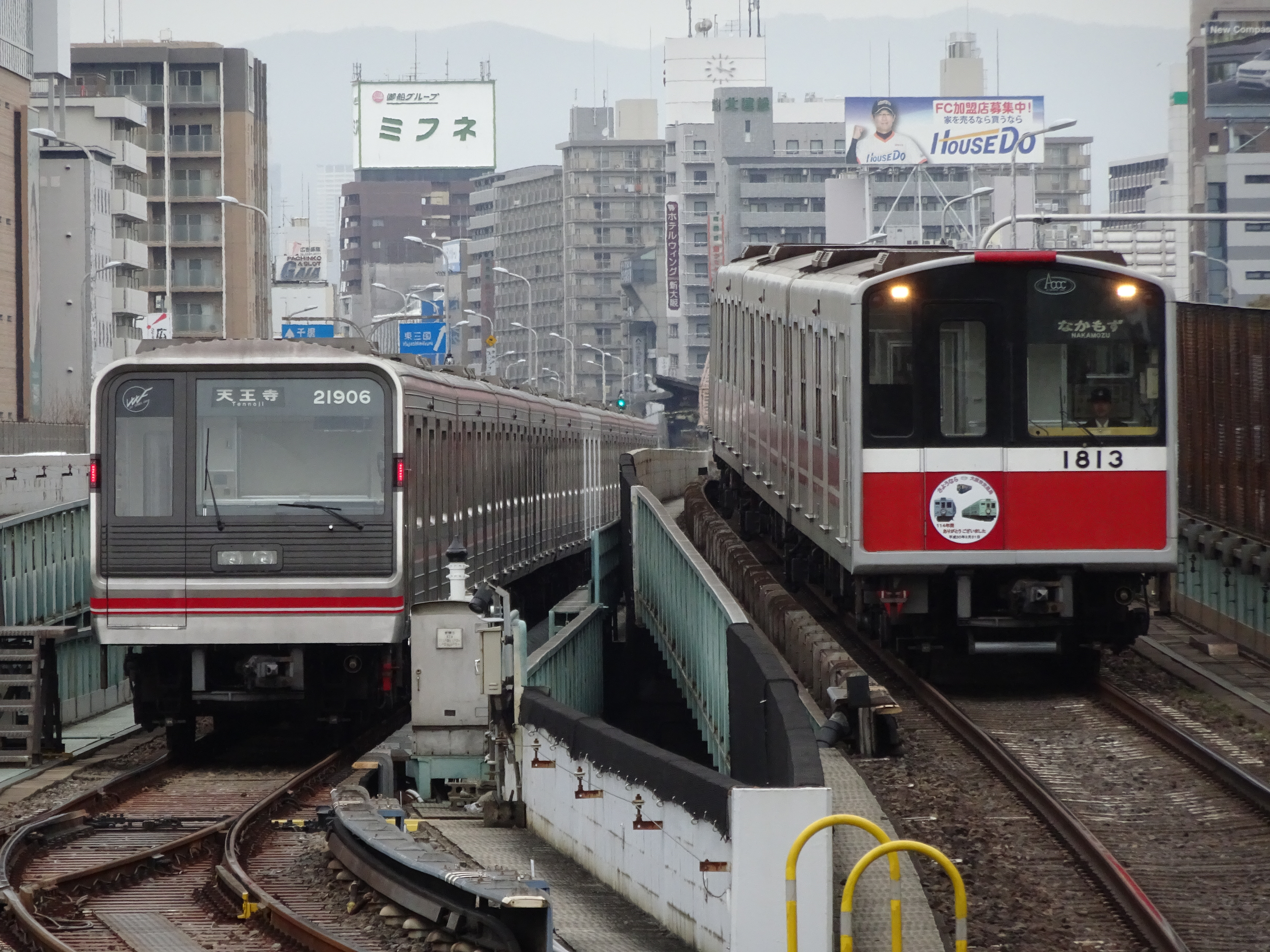 大阪市交通局10系電車 新大阪駅での撮影